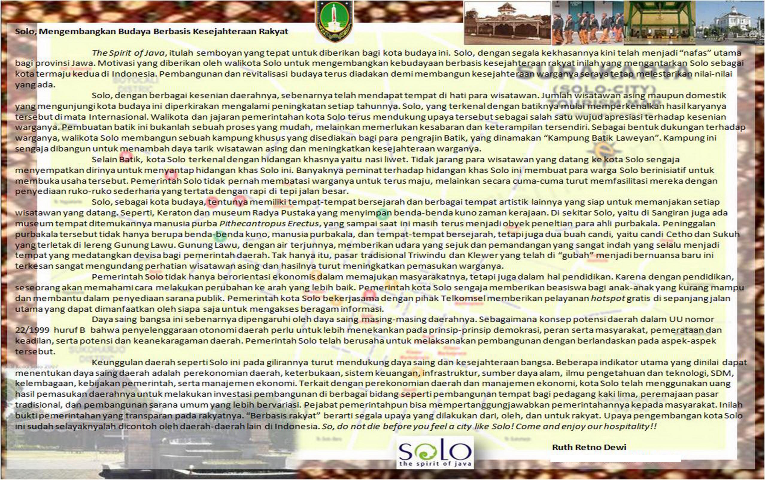 contoh karya advertorial.